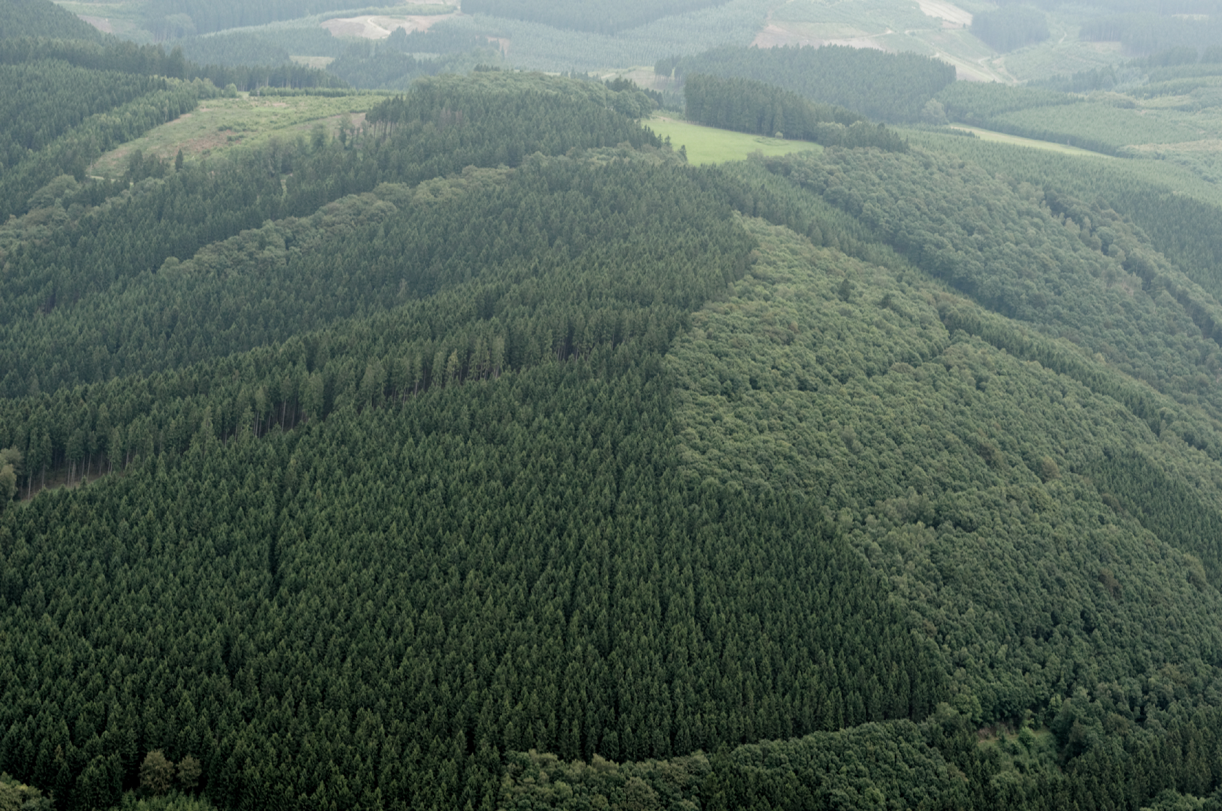 Fotoflug Sauerland Nord. Der Justenberg östlich von Sundern (Sauerland)-Hagen, Blickrichtung Ost The making of this document was supported by the Community-Budget of Wikimedia Germany.